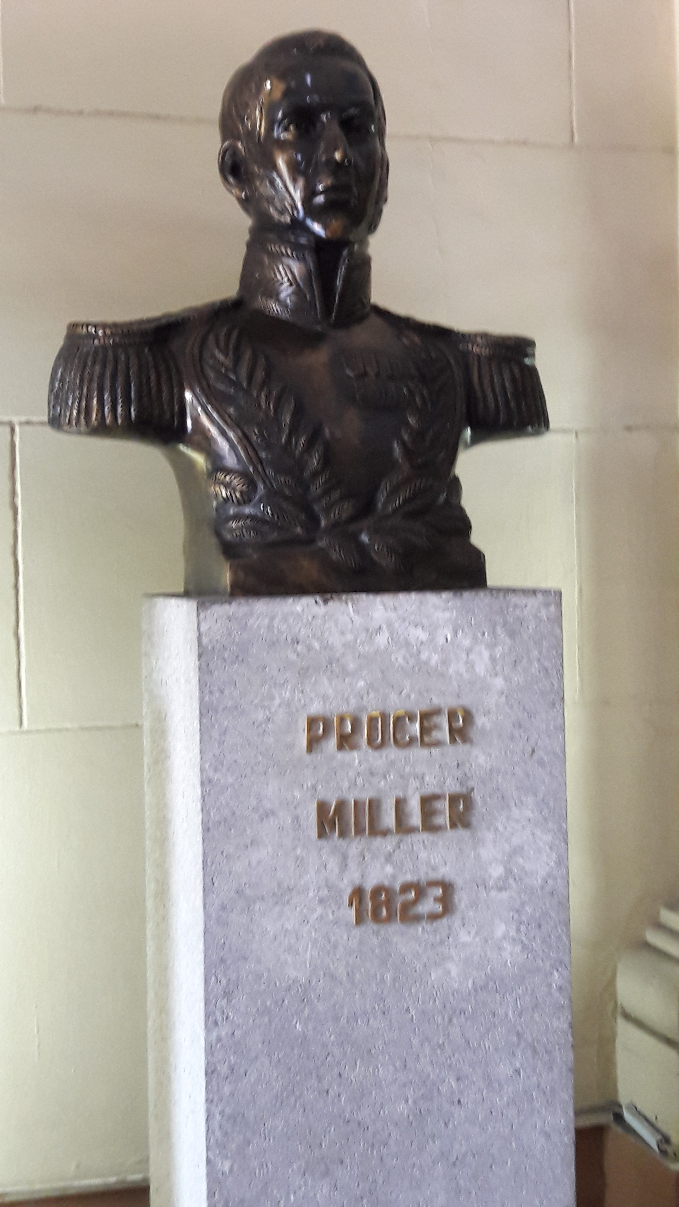 Prócer Miller 1823